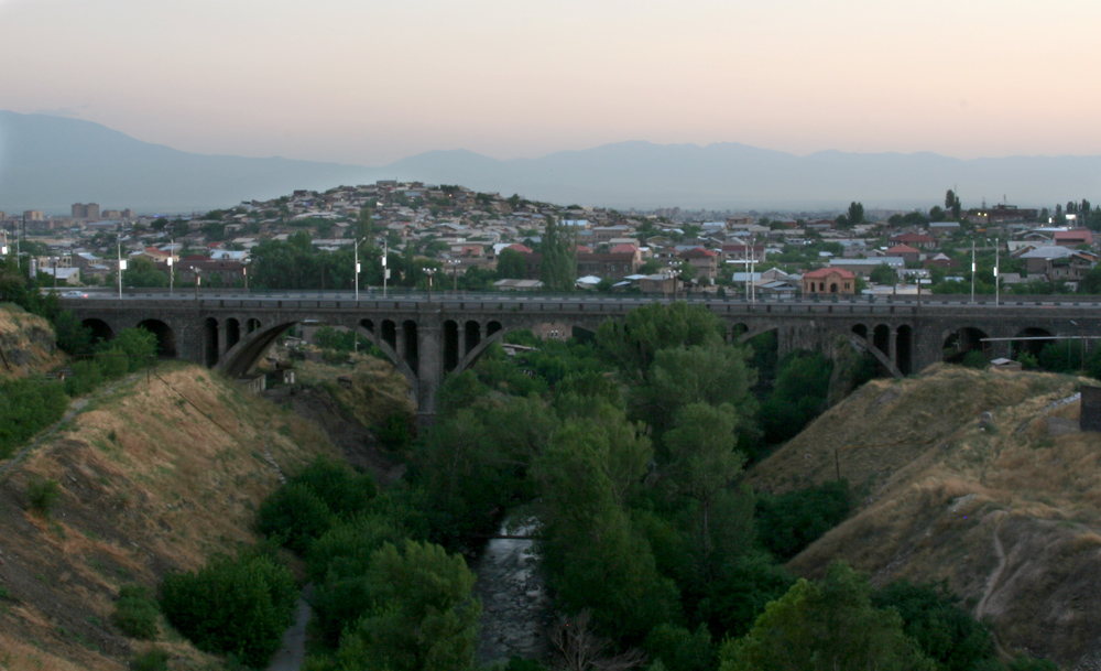 Pont de la Victoire à Erevan, Arménie